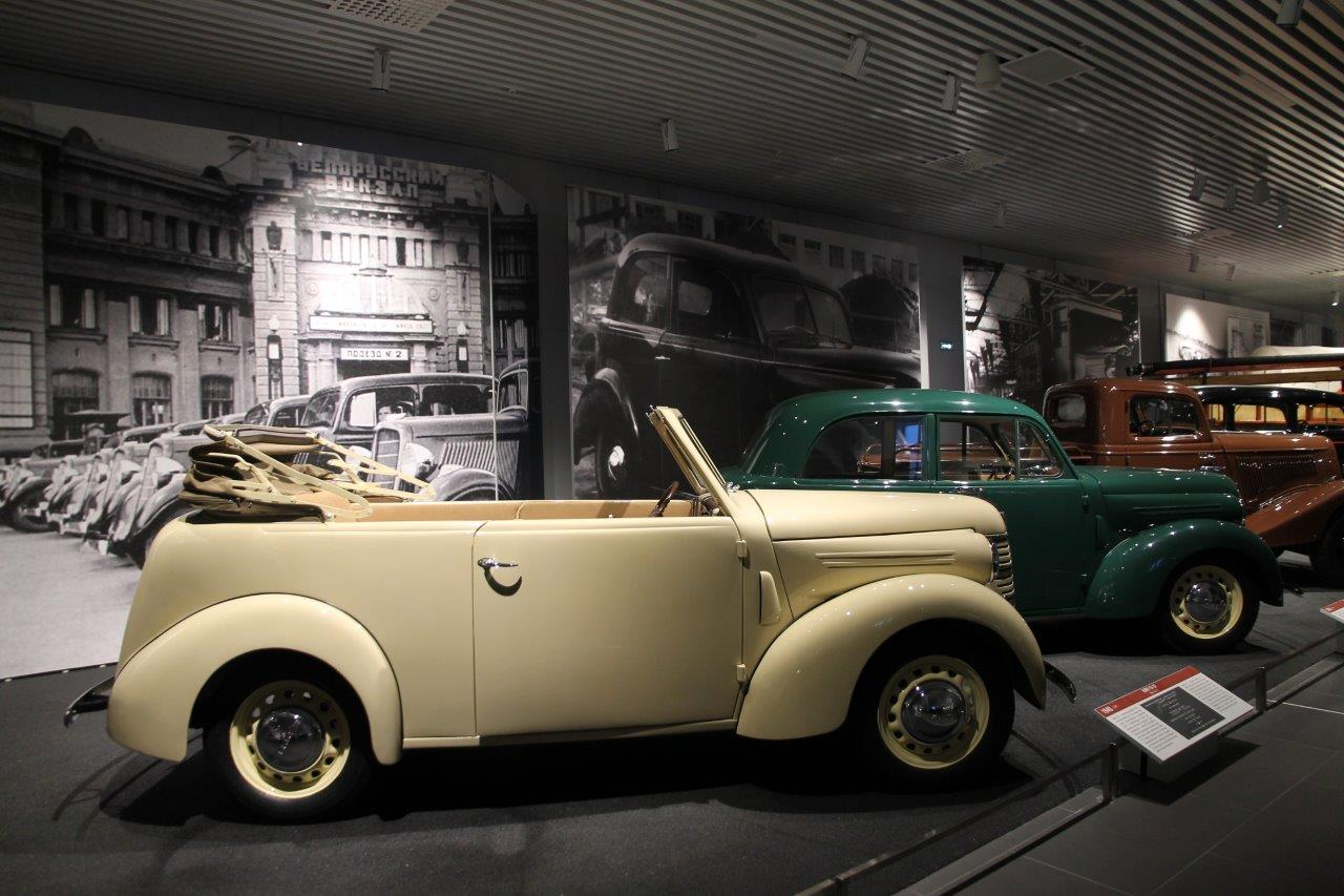 В автомузее появилась единственная в мире машина имени коммунистического интернационала